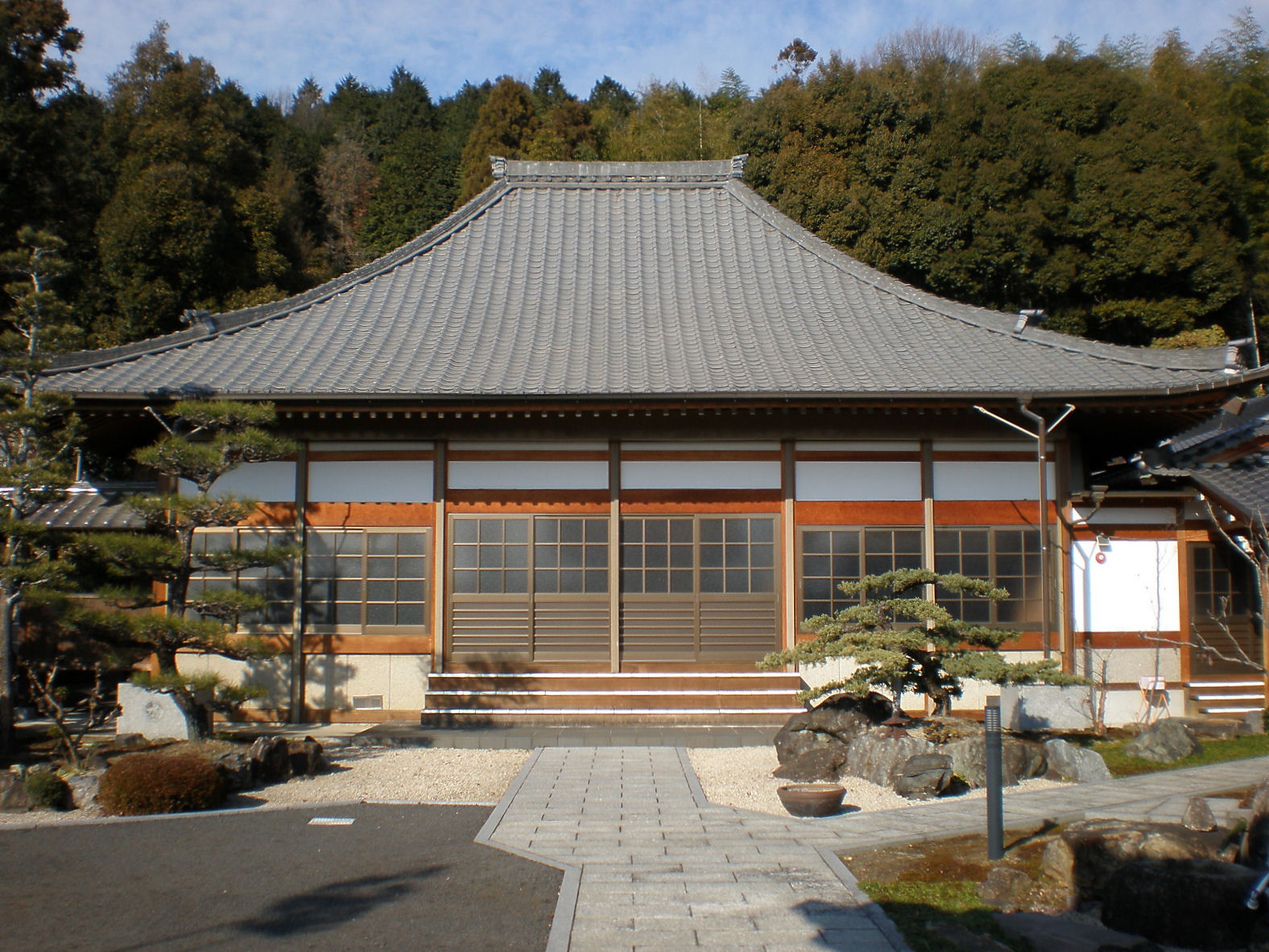 愛知県小牧市にある龍洞院の本堂